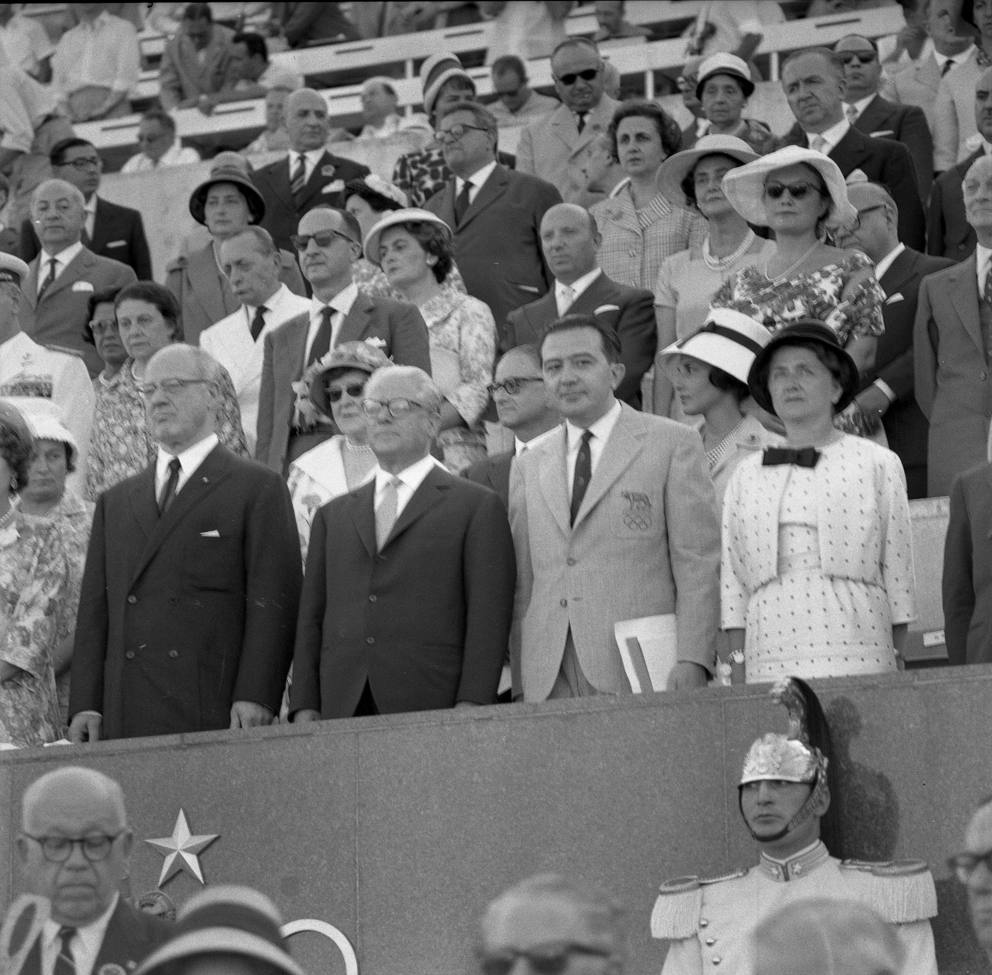 Opening Ceremony of the 1960 Olympics. Il presidente della Repubblica Giovanni Gronchi (C) ed il ministro della Difesa Giulio Andreotti alla cerimonia di apertura